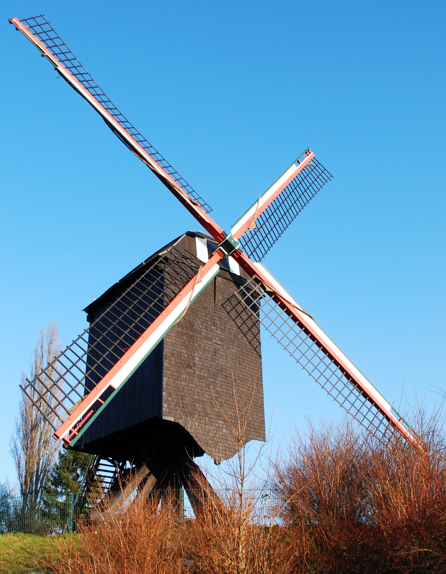 De Lindenmolen te Diest, België